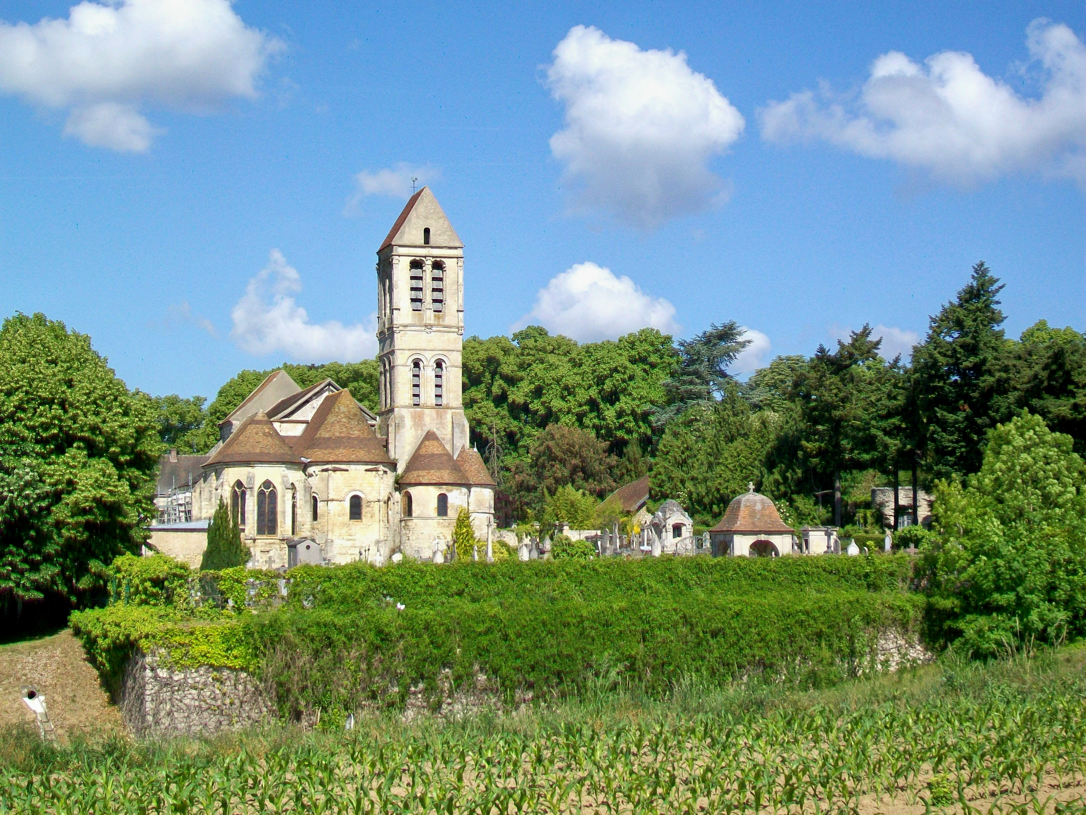 L'église Saint-Côme-Saint-Damien depuis le chemin de la Paroisse (GR 1 et 655). Entre le mur du cimetière et le champ de maïs, passe la D 316 dans une tranchée (déviation du centre-ville).